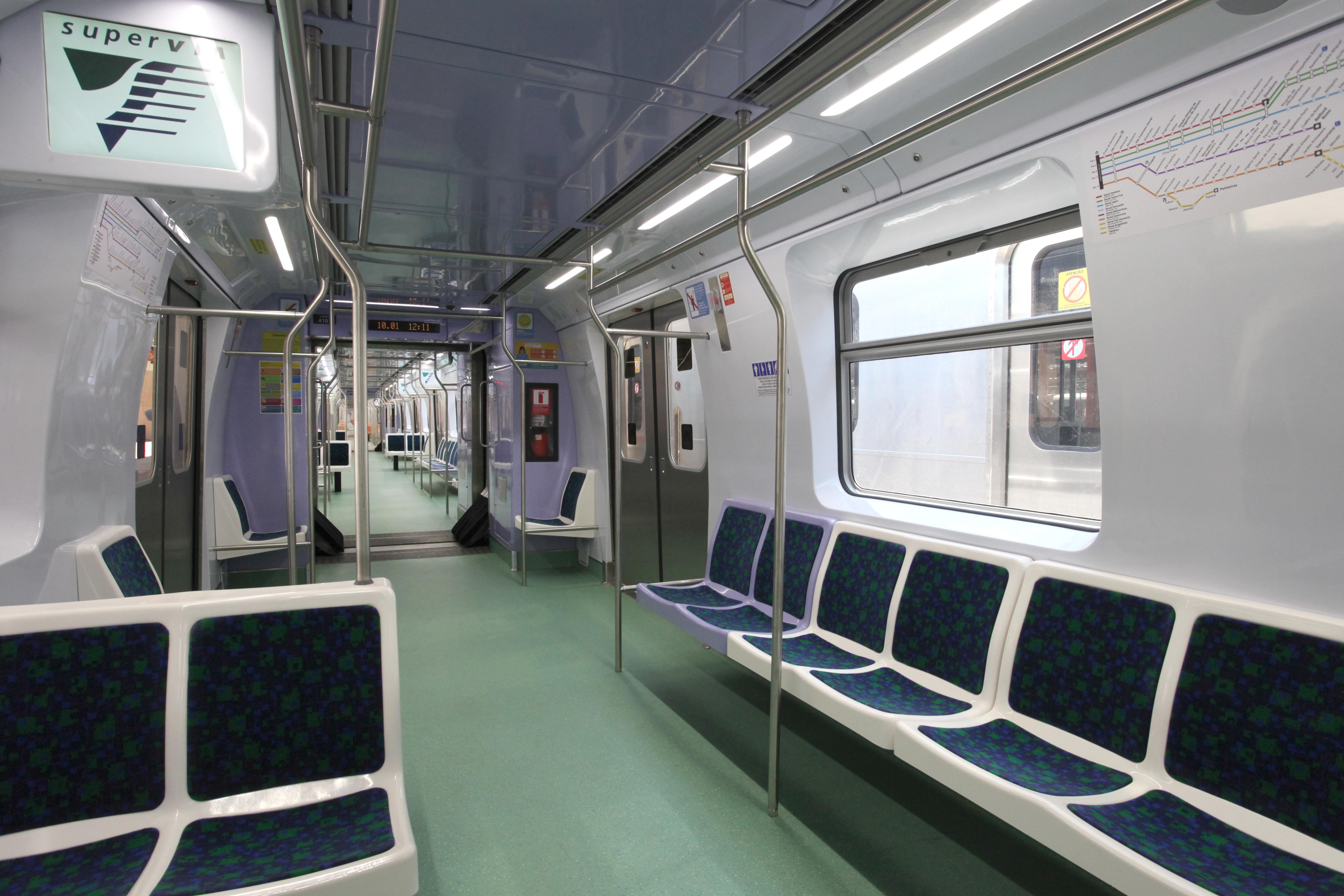 Novo trem da SuperVia, estacionado na plataforma 13 para apresentação a imprensa.